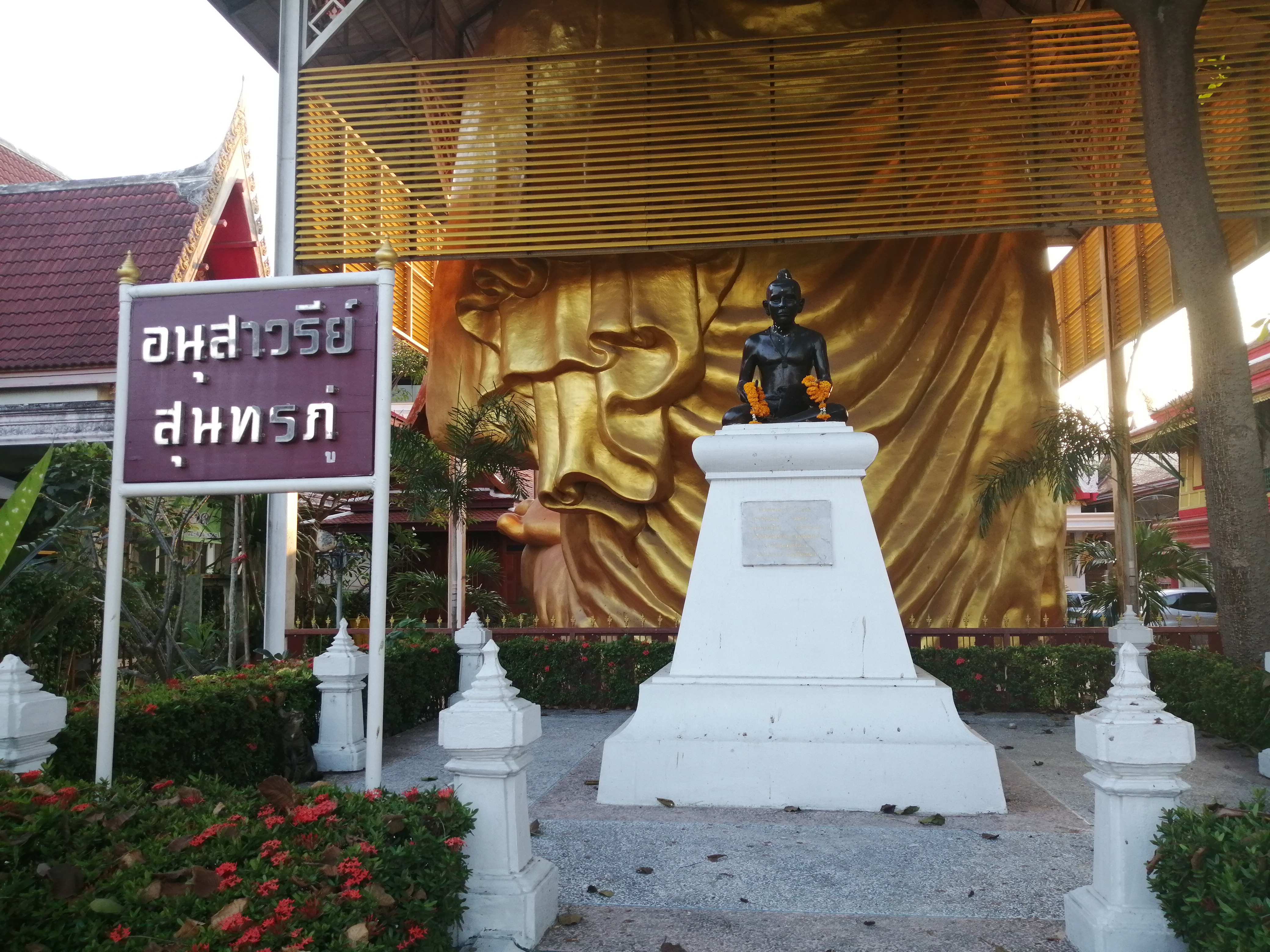 อนุสาวรีย์ สุนทรภู่